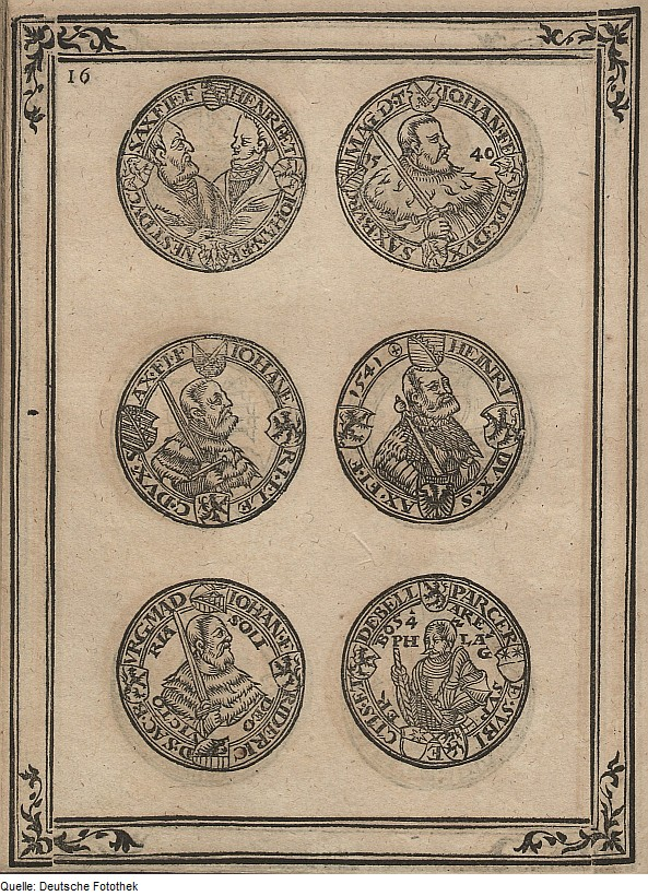 Original image description from the Deutsche Fotothek Geldwesen & Münzwesen & Münze & Taler